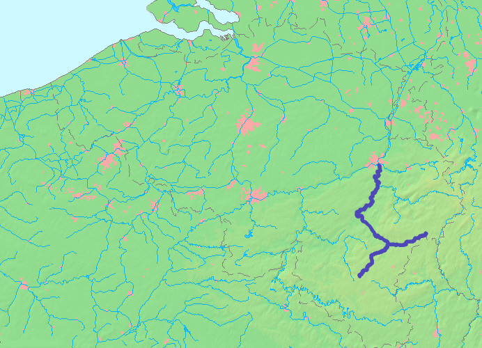 Kaart van de Ourthe op basis van Wikimedia Commons kaart MapBelgiumWater